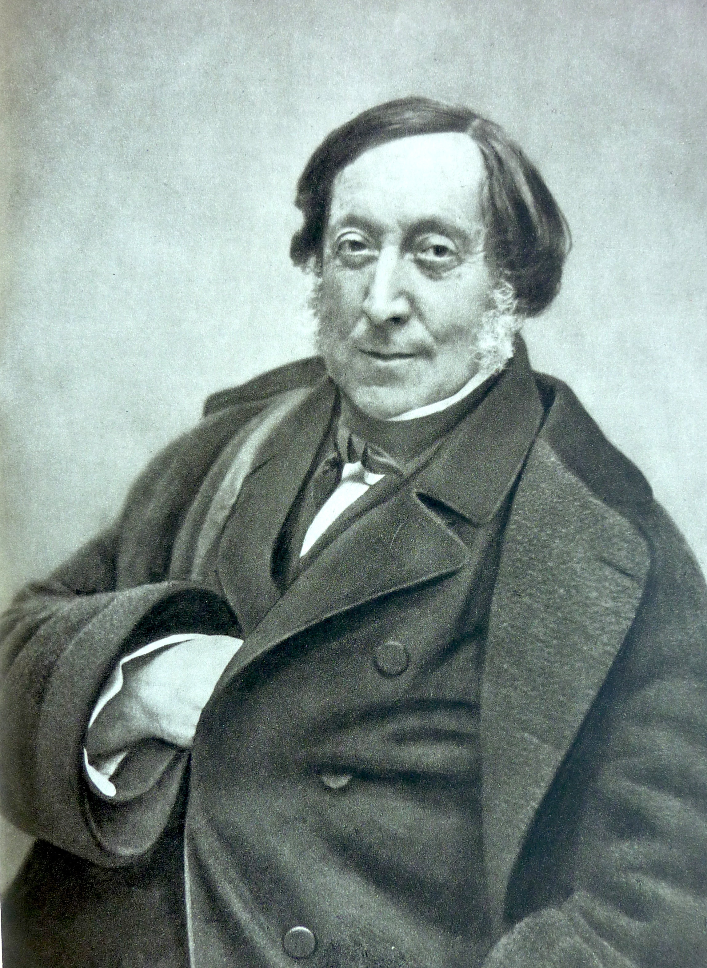 Gioachino Rossini, Foto von Nadar